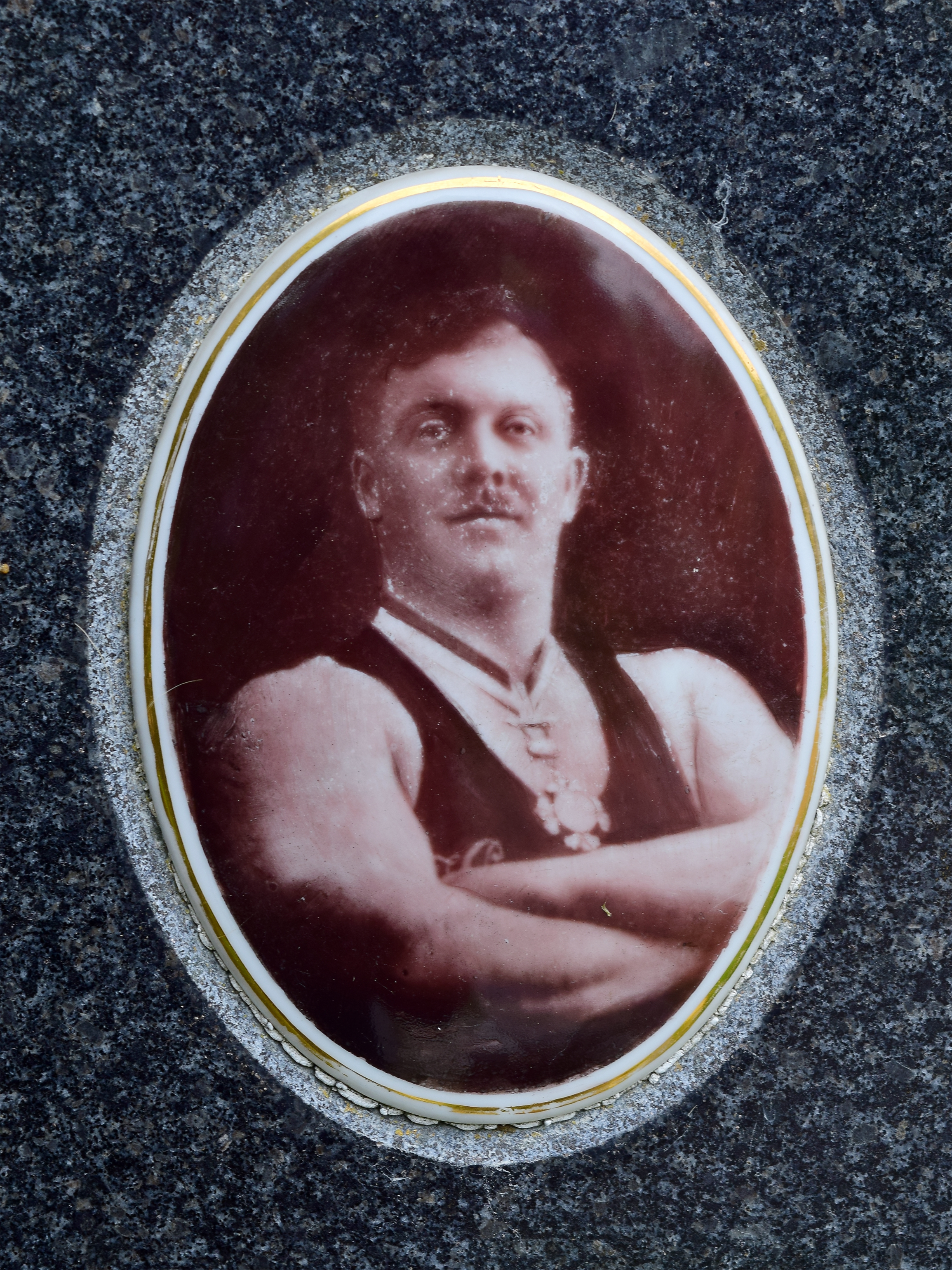 Gesamtanlage, Zentralfriedhof